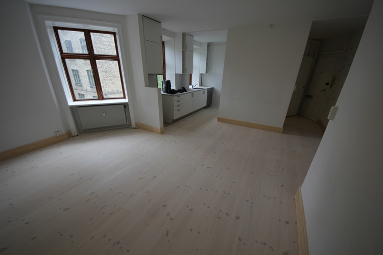 nylagt lyst plankegulv i lejlighed med køkken.